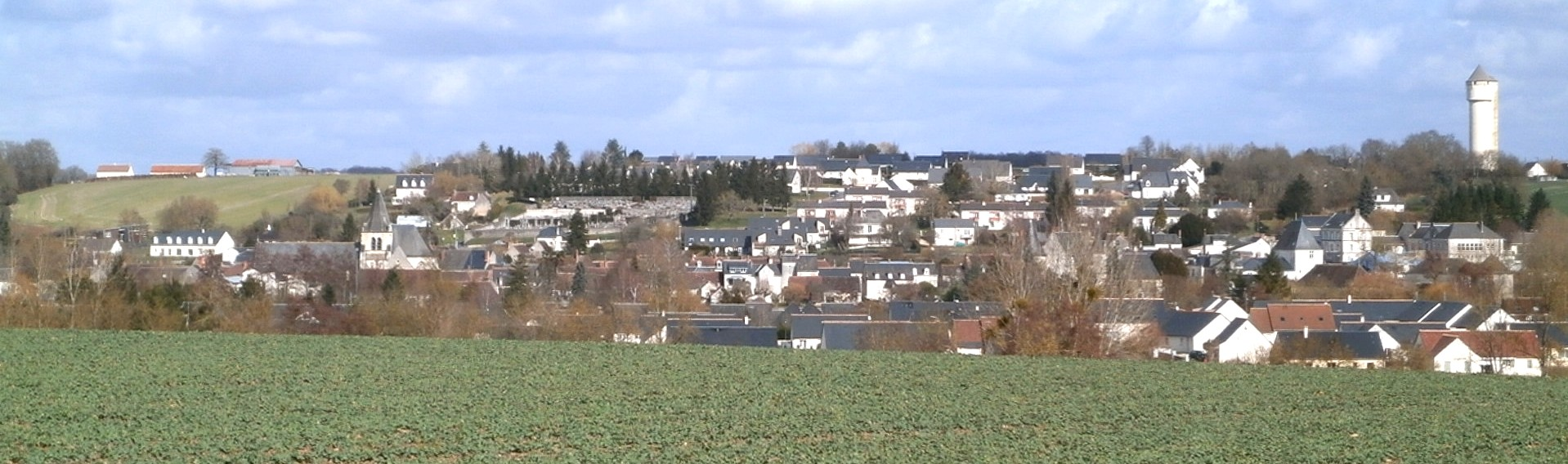 Vue panoramique du bourg